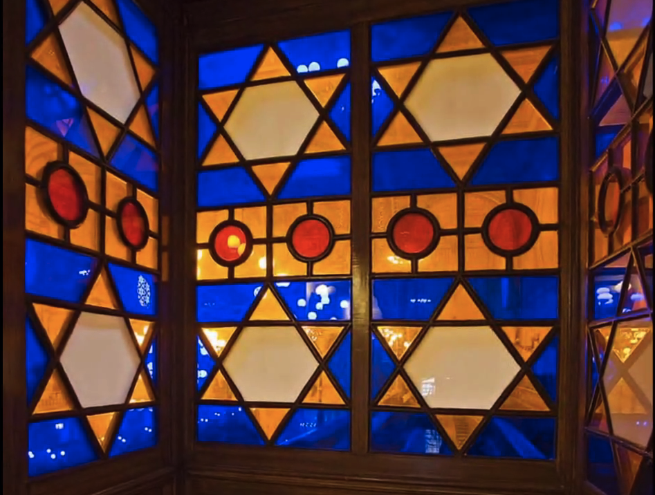 Üvegablak a karzat ajtóin (Dohány utcai zsinagóga, Budapest)